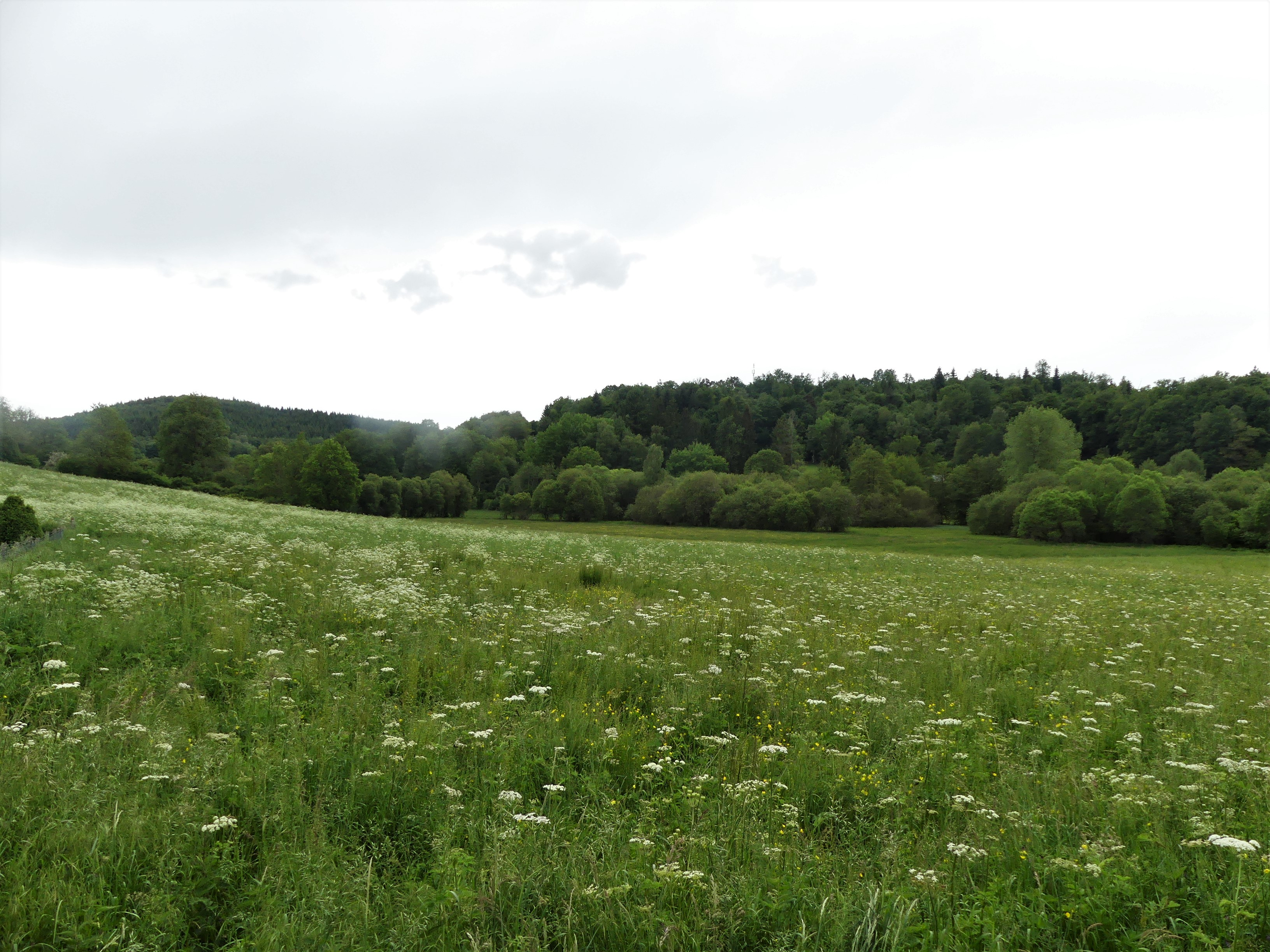 Paysage à Magnat-l'Étrange, Creuse, France.